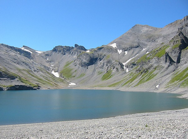 Lac du Vieux Emosson